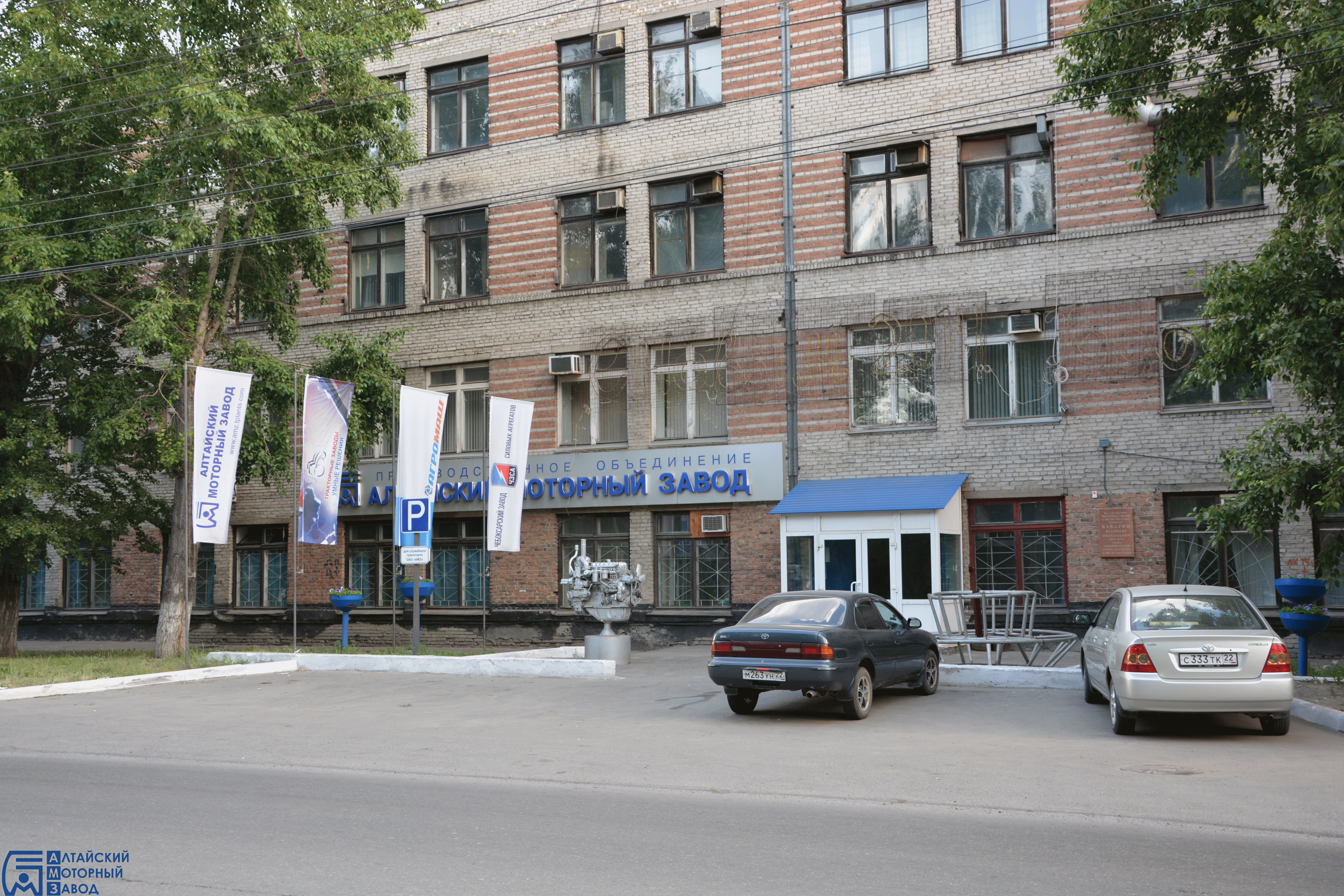 Проходная Алтайского Моторного Завода